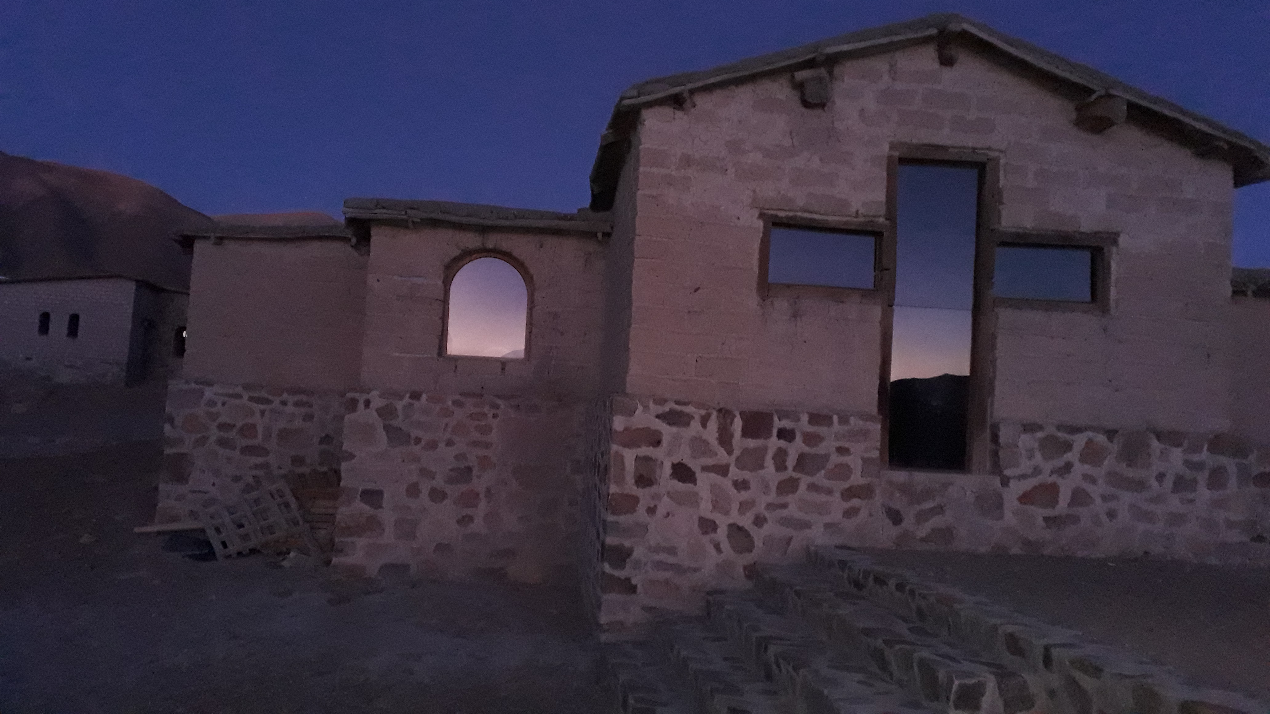 Capilla más nueva de la Quebrada del Toro, construida en el año 2005, dedicada a Santa Teresita. Sus cimientos son de piedra con paredes de adobe, su techo es de madera de cardón, caña y torta de barro. En su interior se destaca la cruz del altar diseñada sobre el muro posterior, que al estar perforada y cubierta con vidrio genera una integración total con el paisaje. Esta iglesia es fruto del trabajo de toda la comunidad del El Rosal junto al Padre Chifri.iglesia